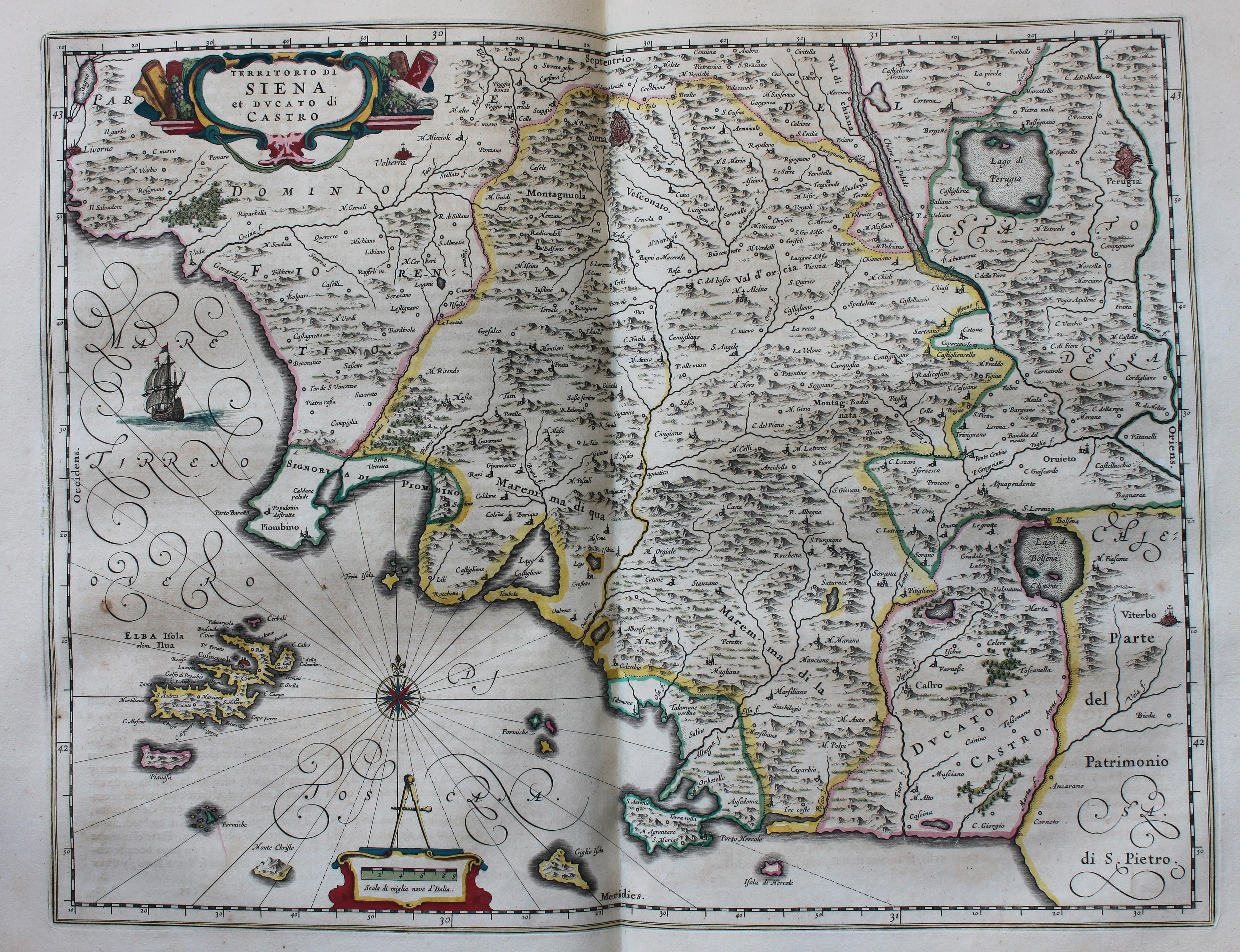 Descripción bibliográfica: Geographia Blaviana. - [Amsterdam : Juan Blaeu, 1659] . - [32], VI, 96 p., 34 f., h. 35a, 35b, 35c, 35d, 36-44 f., 34, [2], 36-40, [2], 43-70 [i. e. 75], [1] f., [20] p. de map., [9] f. de map., [4] f. pleg. de map., [2] f. de plan., [2] f. ge grab. : |bil. ; |cFol. marca major (57 cm.) . - En la dedicatoria a Felipe IV: "Presenta ... El Atlas Universal y Cosmographico de los orbes y terrestre ... Juan Blaeu" . - Título tomado del frontispicio. -- Privilegio fechado en 1659. -Errores de pag. - Sign.: 1, *2, **3, ***-****2, a-e2, A-I2, K1, L-Z2, Aa-Dd2, 4 2, Ee-Ff2, A-I2, K1, L2, M1, N-Y2, Z5, Aa-Dd2, Ee1, A-D2, E-F1, G-I2, K-L1, M-O2, P1, Q-Z2, Aa-Bb2, Cc1, Dd3, Ff-Zz2, Aaa-Bbb2, . - Frontispicio grab. col. -- Incluye un total de 49 il. entre map., plan. i grab. Materia: Atlas - Obras anteriores a 1800 Impresor: Blaeu, Joan, 1596-1673, imp. Lugar de impresión: Holanda. Amsterdam Localización: Vea la ilustración en su contexto Visite también la exposición "Cartografía histórica en la Biblioteca de la Universidad de Sevilla"